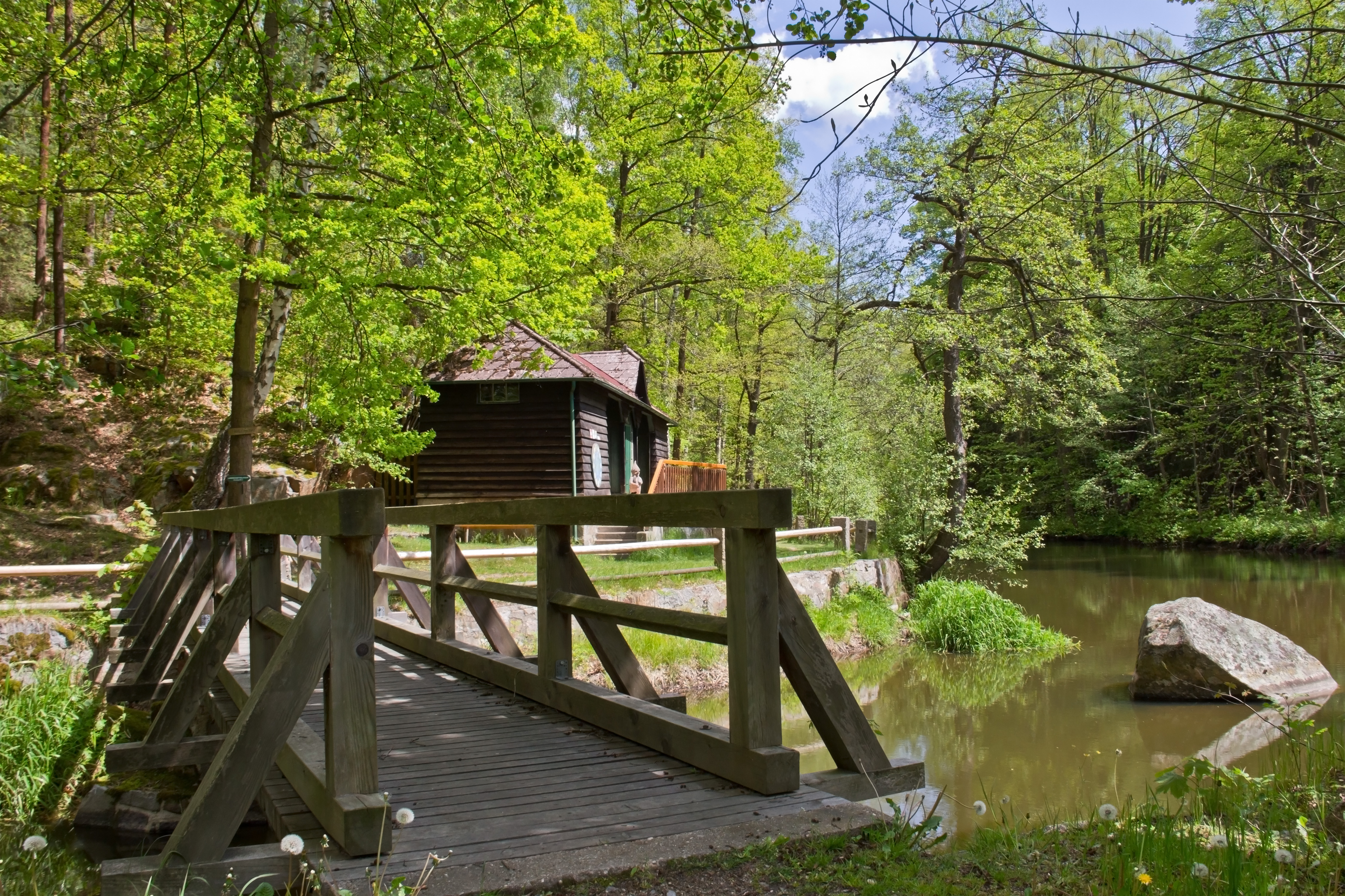 Malerwinkel in Gmünd This media shows the natural monument in Lower Austria with the ID GD-001.